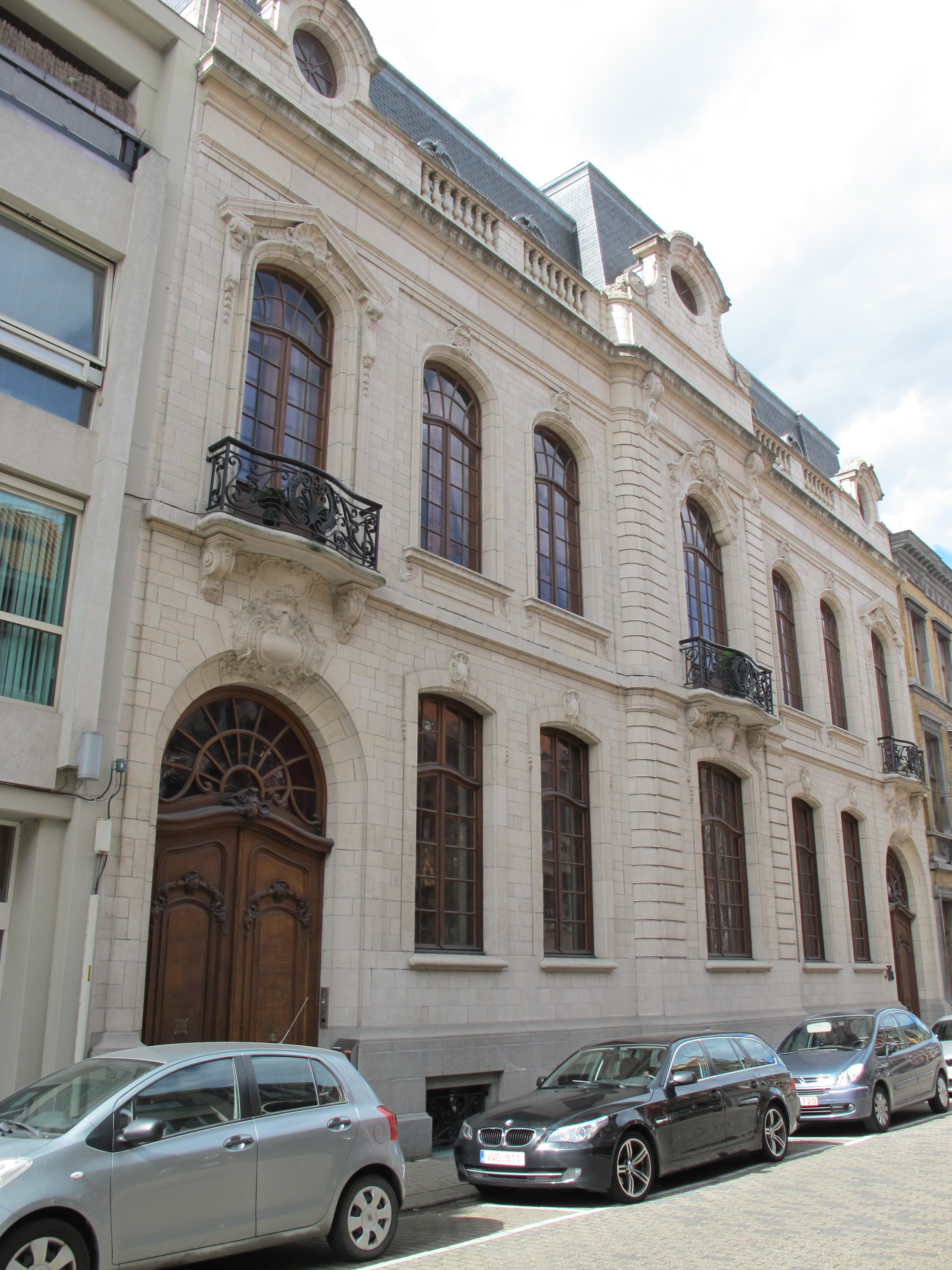 Nationale Bank van België, neo-Lodewijk XV naar ontwerp van architect M. Winders, Prins Albertstraat, Sint-Niklaas